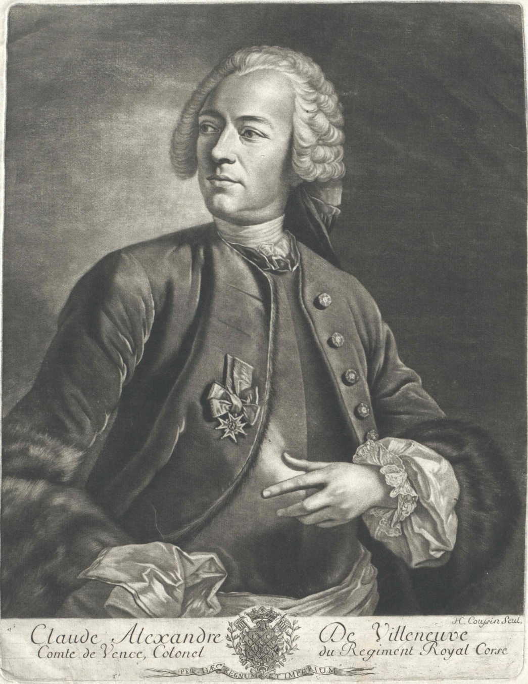 Claude-Alexandre de Villeneuve, comte de Vence